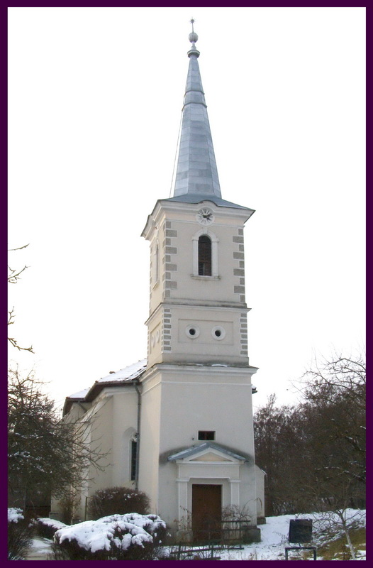 Cegőtelke / Ţigău 2009